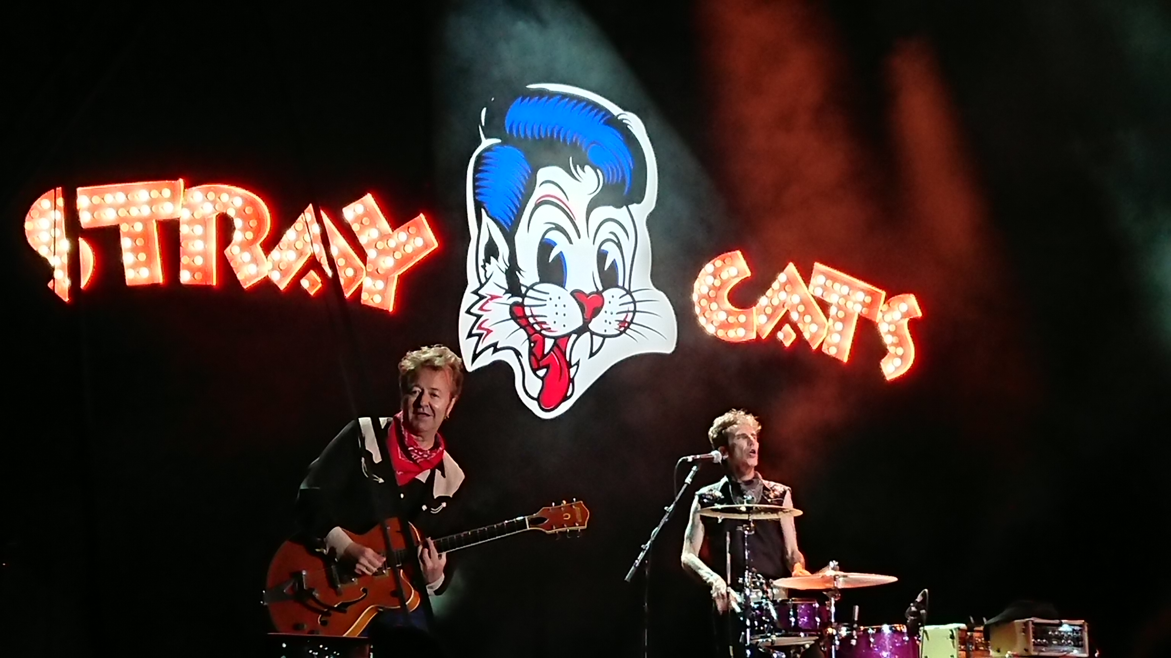 Live-Auftritt der Stray Cats am 11. Juli 2019 in München